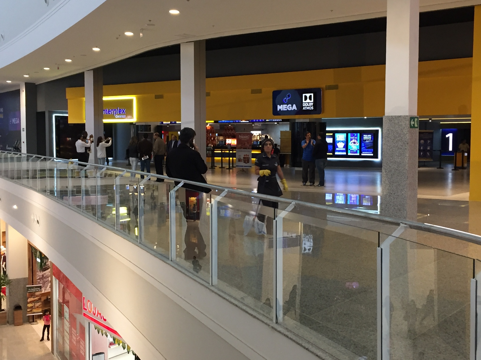 Hall de entrada do Centerplex Boulevard Conquista